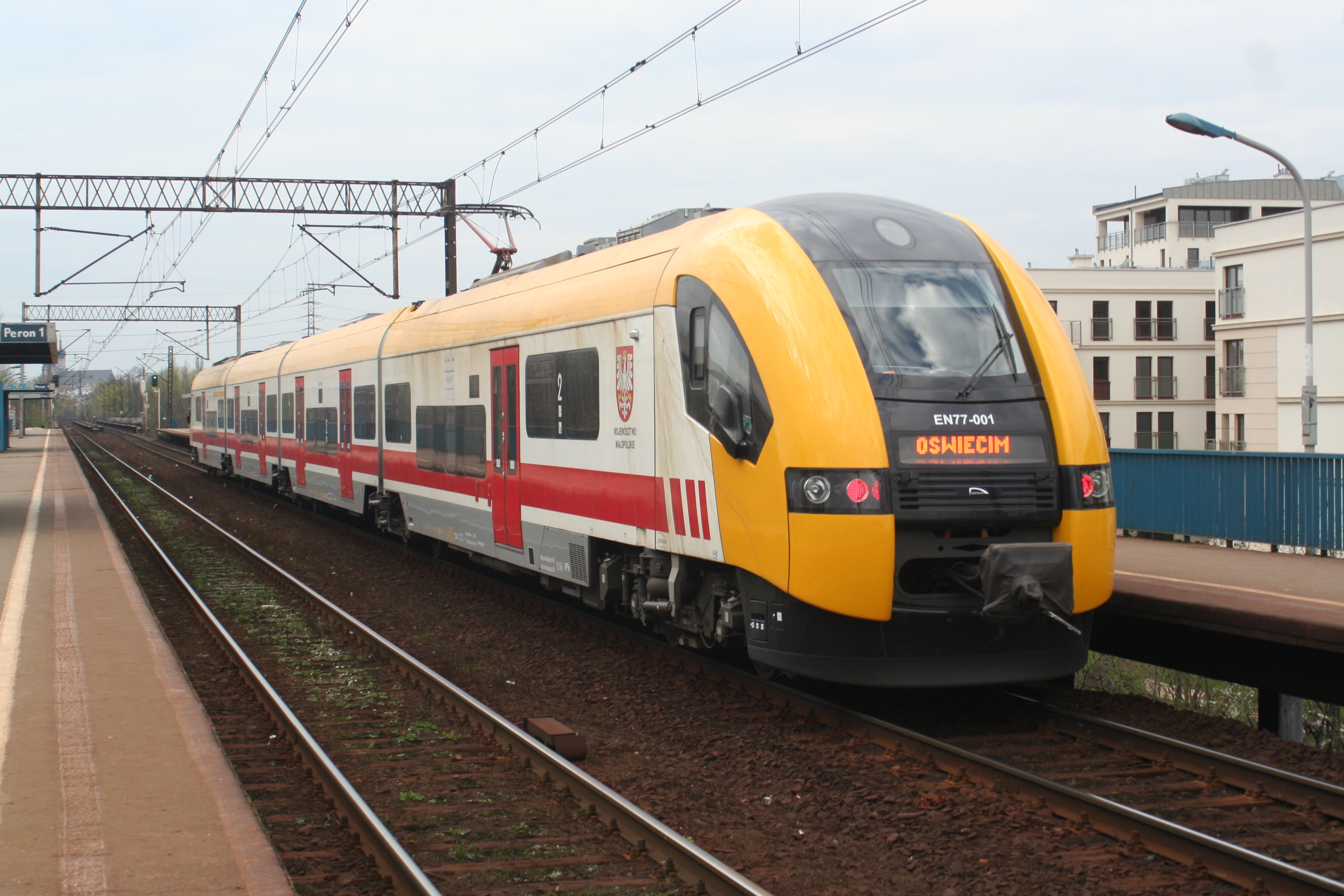 elektryczny zespół trakcyjny EN77 (oznaczenie wg schematu PKP) / 32WE Acatus II (oznaczenie producenta - PESA) numerze czołowym 001 w barwach województwa małopolskiego, na stacji Kraków Zabłocie 15 kwietnia 2011 roku.